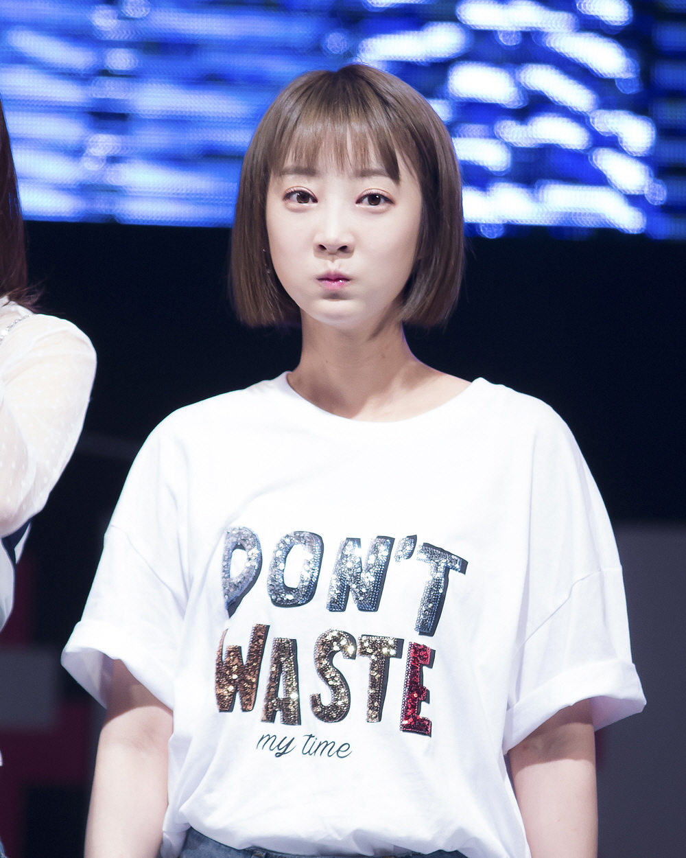 170518 창원폴리텍 EXID